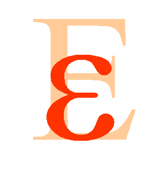 Greek letter